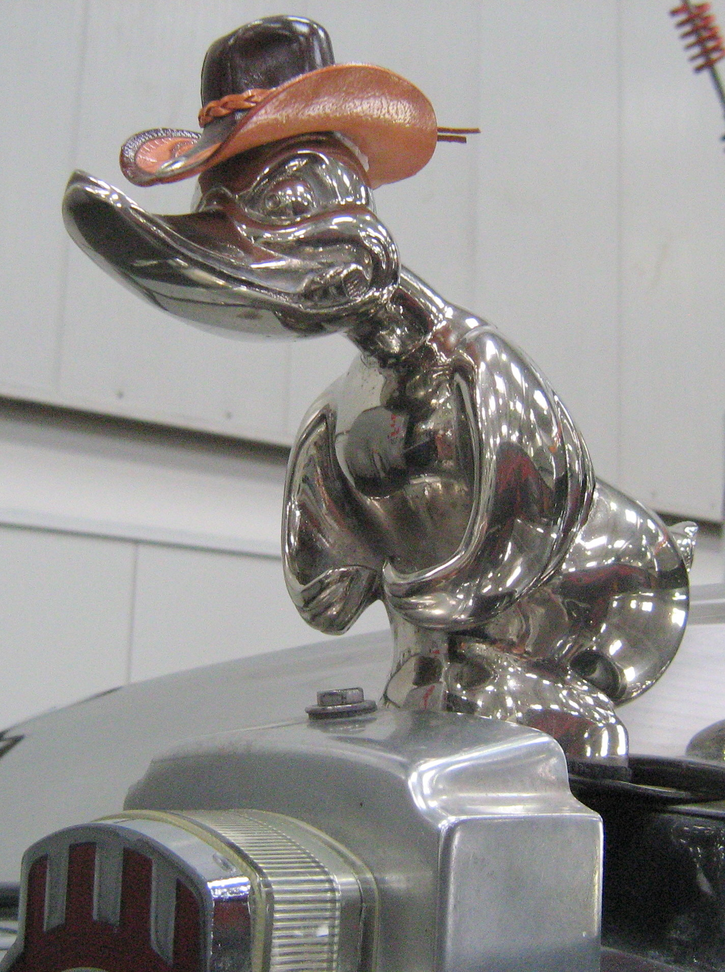 Rubber Duck als Metal-Ente auf dem Motorkühler